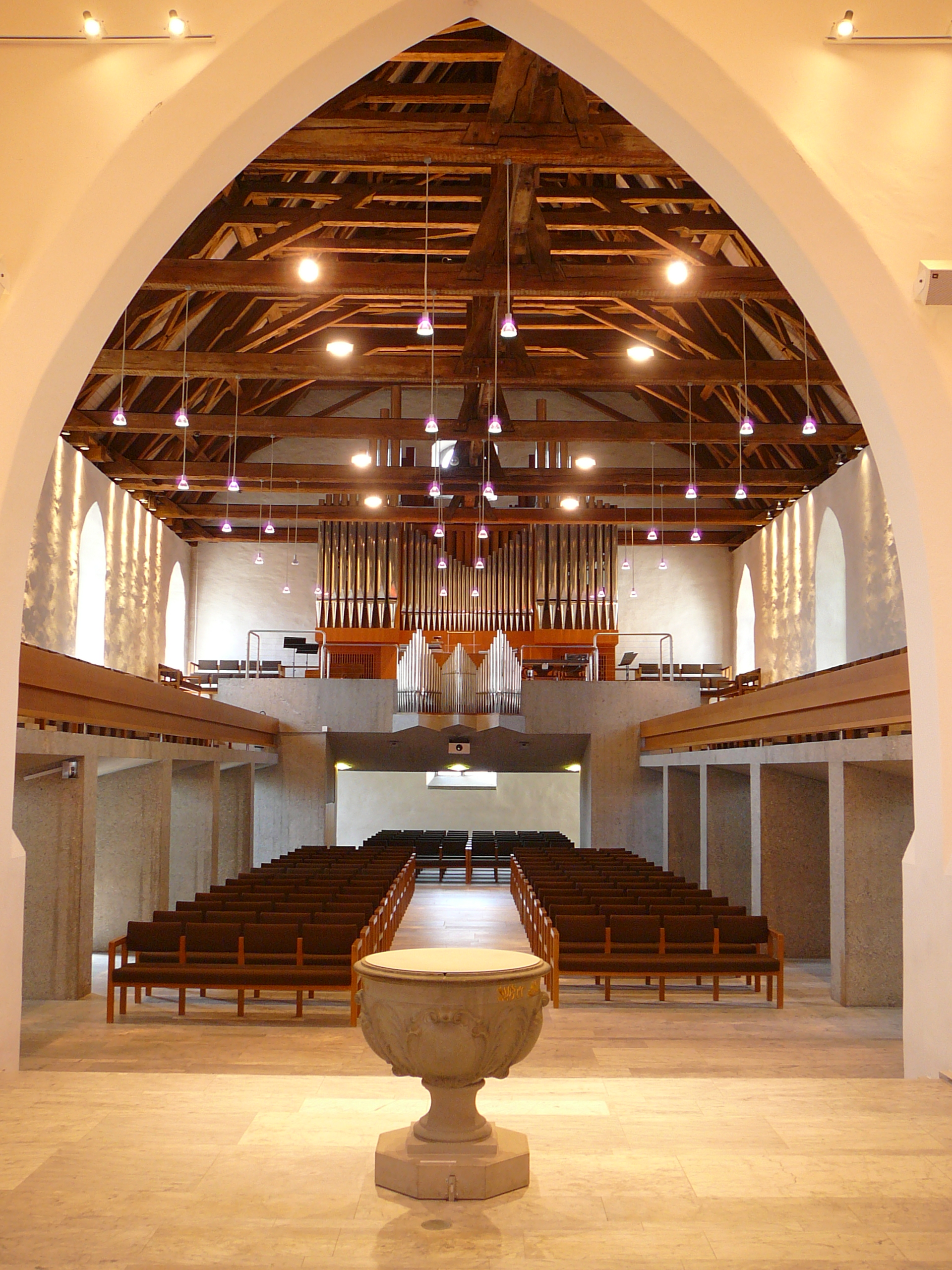 Reformierte Kirche Bülach, Längsschiff